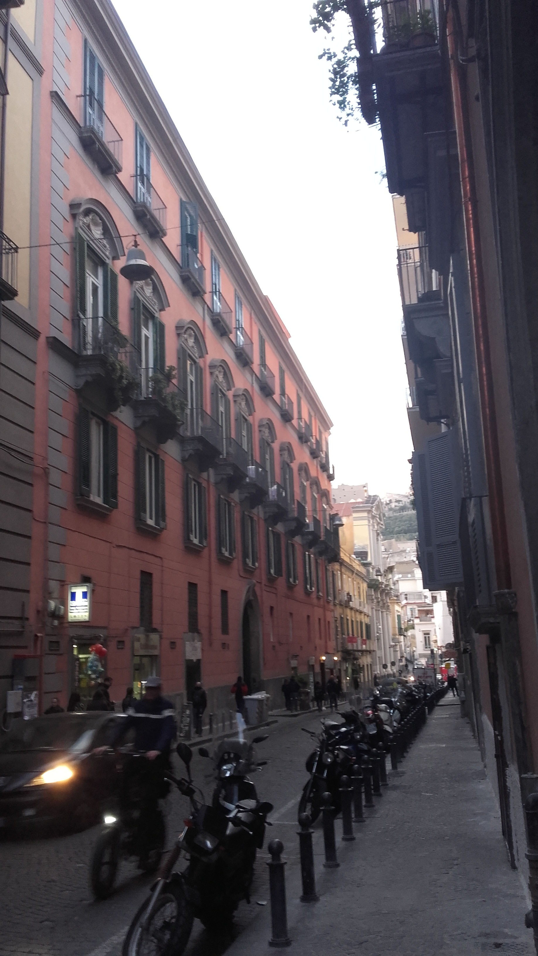 Palazzo del '600, eretto dai monaci teatini di Santa Maria degli Angeli. Acquisato successivamente dai Caracciolo di Brienza e poi dai Barracco che lo ristrutturarono nell'Ottocento in stile neo-classico.